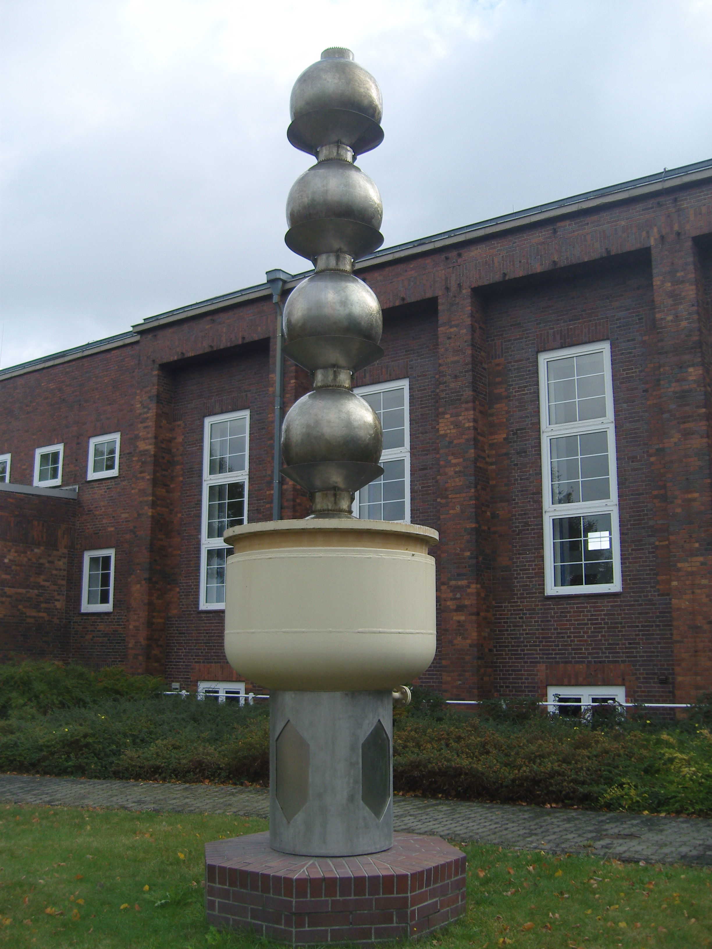 Fallfilmverdampfer aus der MDI-Produktion vor dem Kulturhaus der BASF in Schwarzheide, als Brunnen genutzt